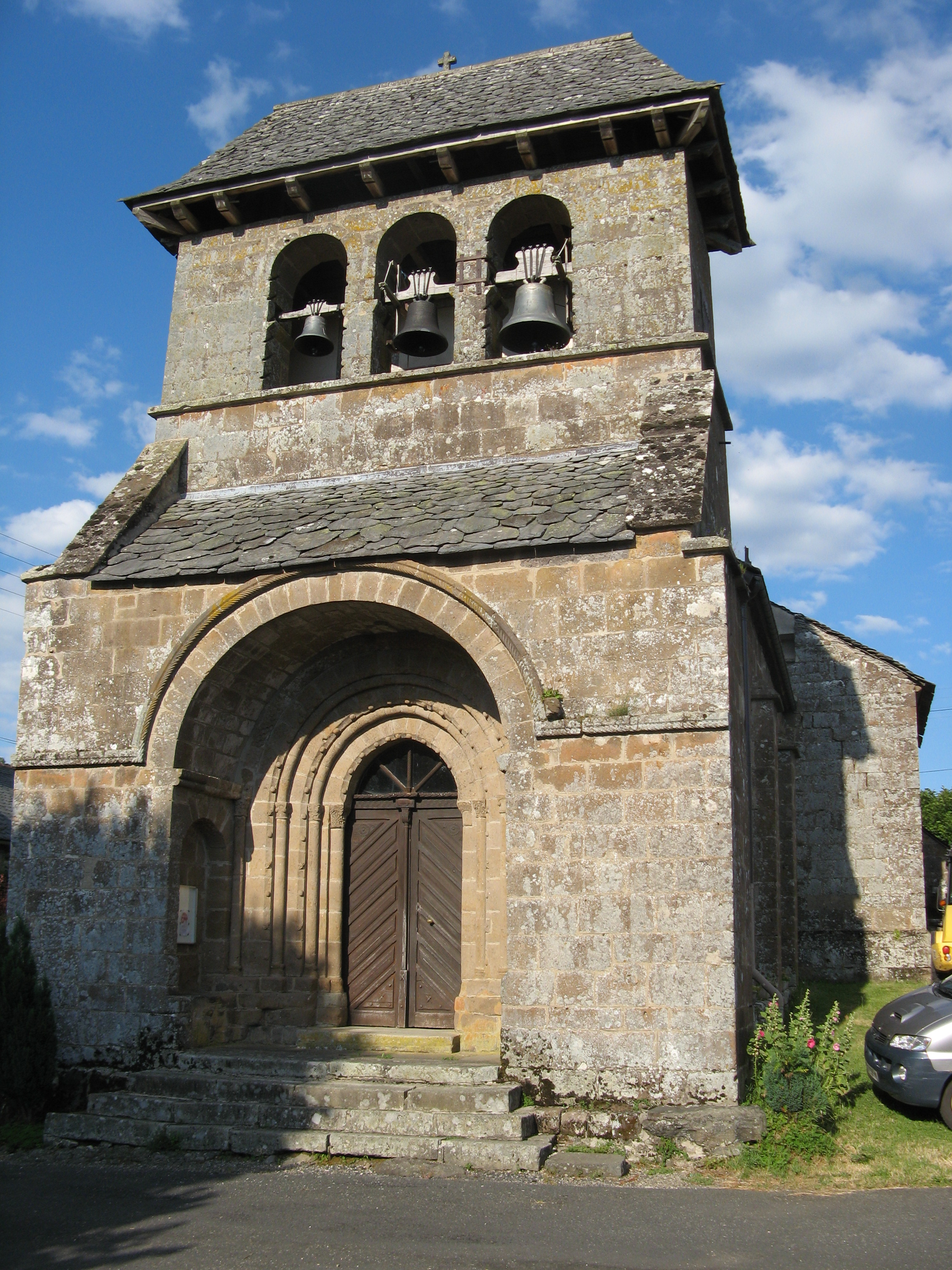 Le Monteil, Chastel-Marlhac, église Saint-Victor-et-Sainte-Madeleine.